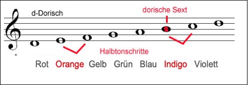 Sir Isaak Newton wählt die Segmentgrößen in seinem siebenteiligen Farbkreis entsprechend den Intervallen einer dorische Tonleiter.